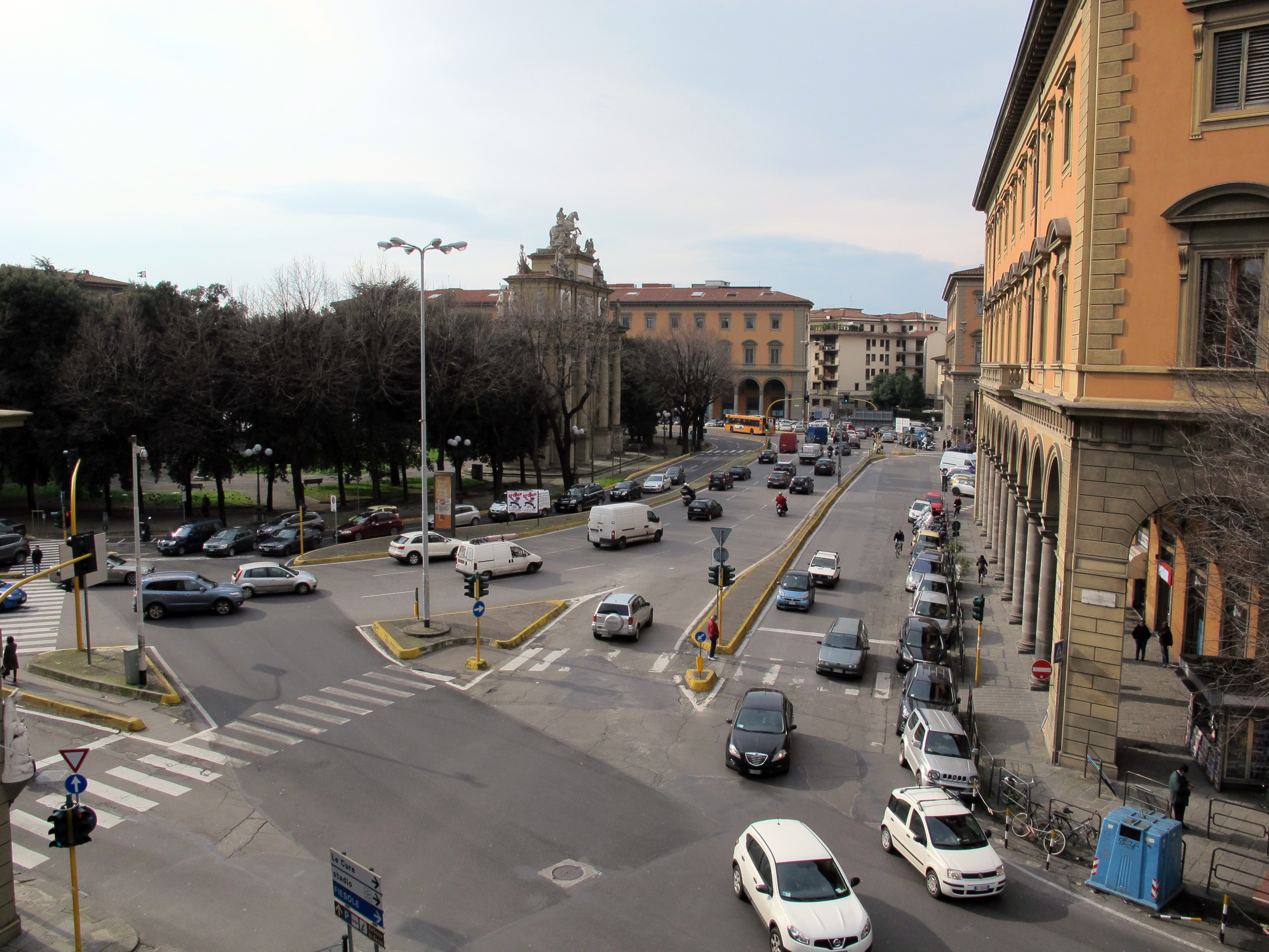 Firenze